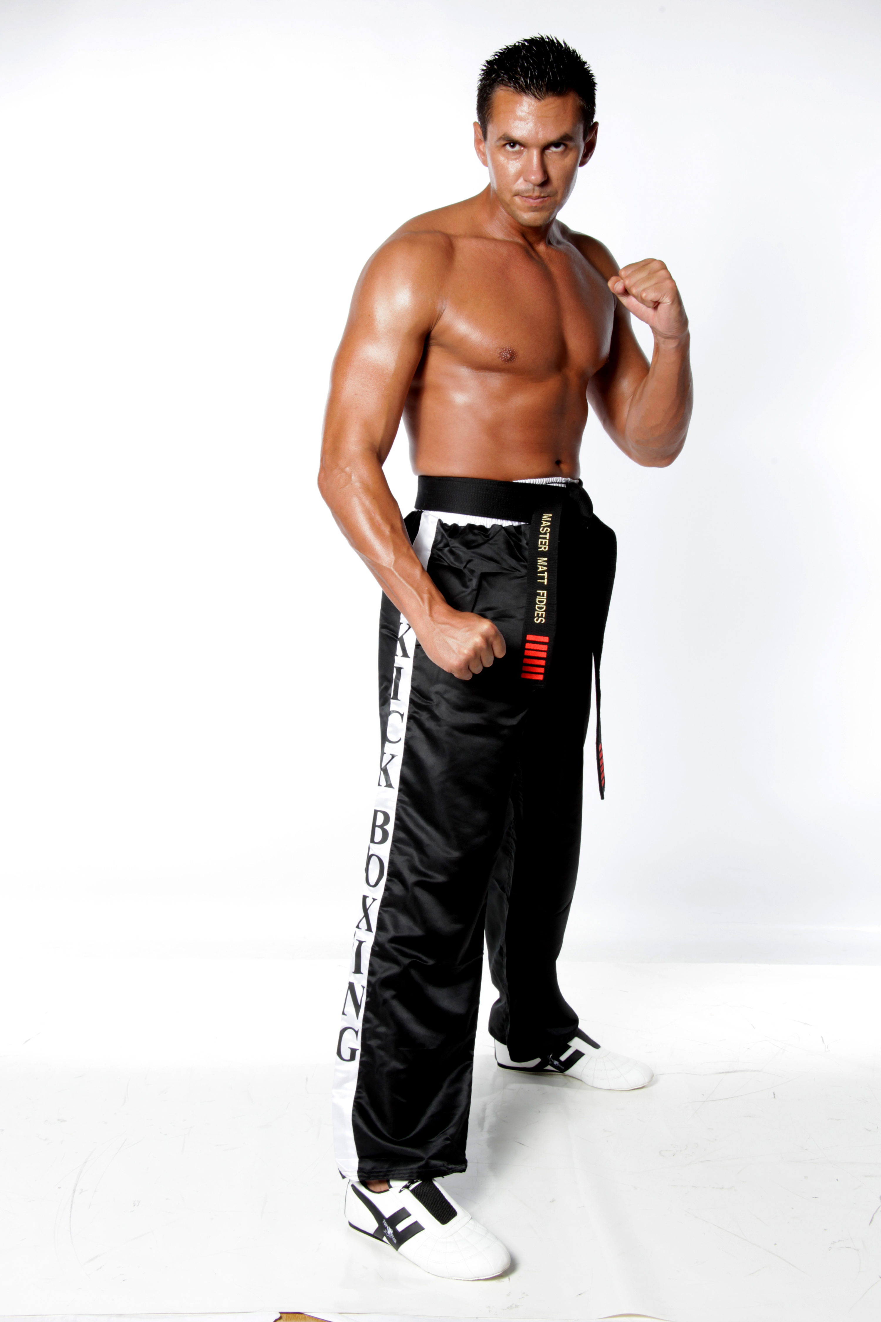 Matt Fiddes' profile picture